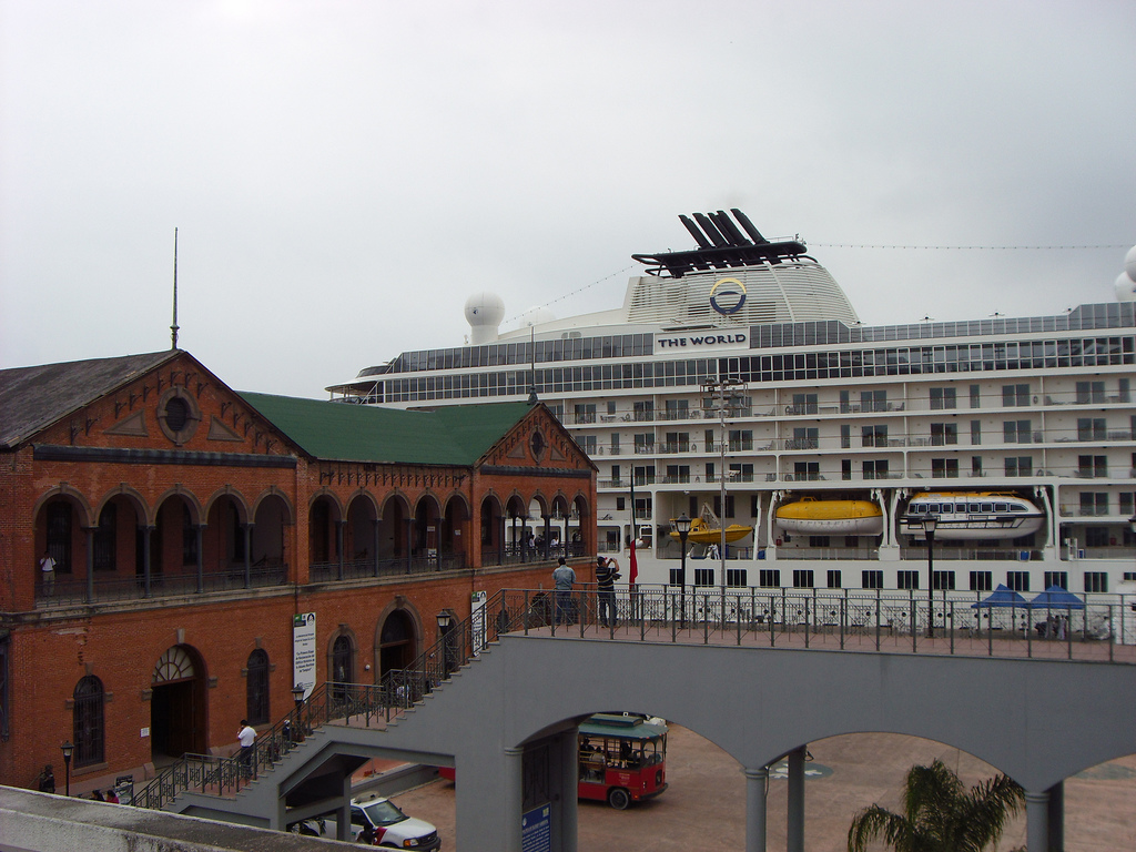 Aduana Marítima de Tampico.Catalogado como el edificio mas bello de Tampico data de 1896 y fué inaugurado por el General Porfirio Díaz en 16 de octubre de 1902.